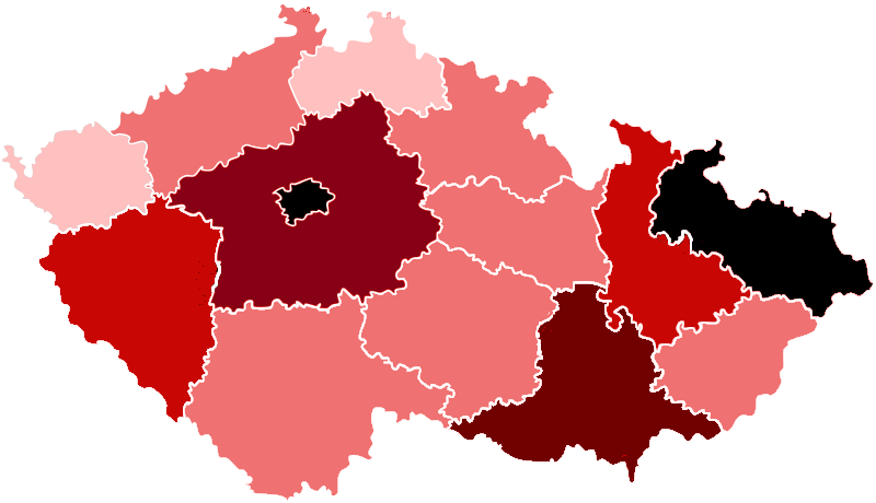 Mapa případů onemocnění covid-19 k 19. dubnu 2020